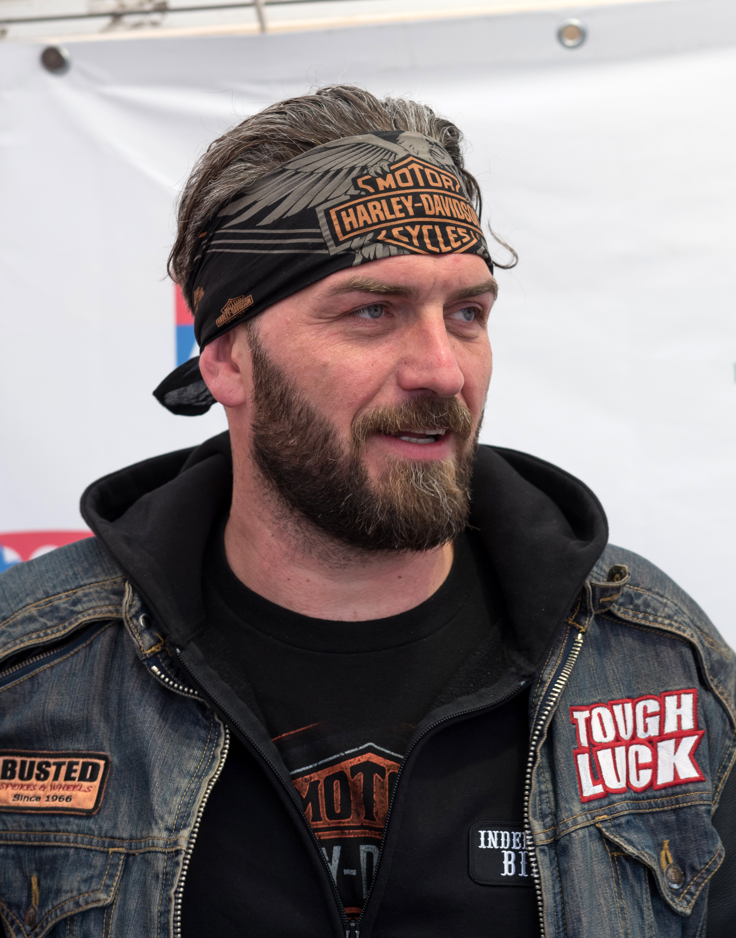 Ingo Kantorek bei den Hamburg Harley Days 2018